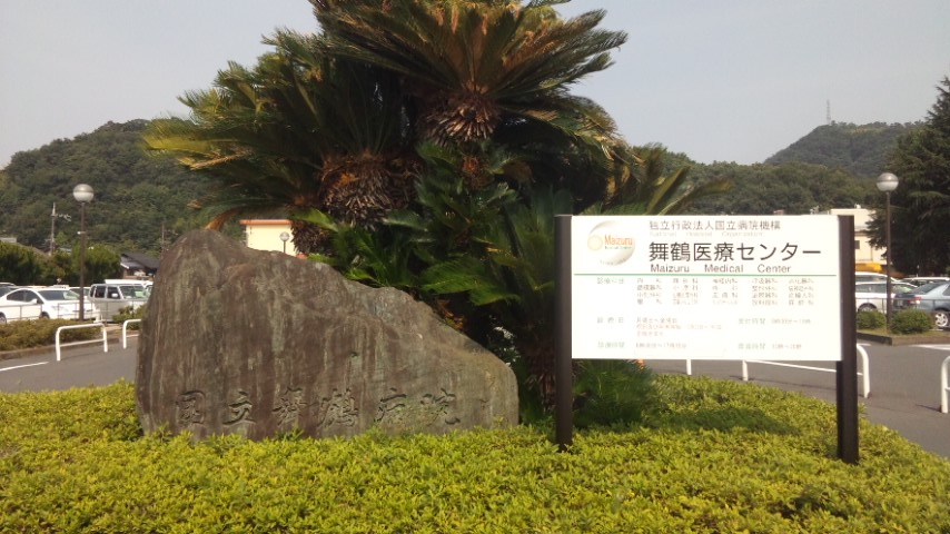 舞鶴医療センター前